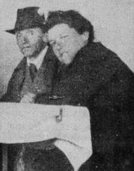 Richard a Hilde Pollak v Dornachu